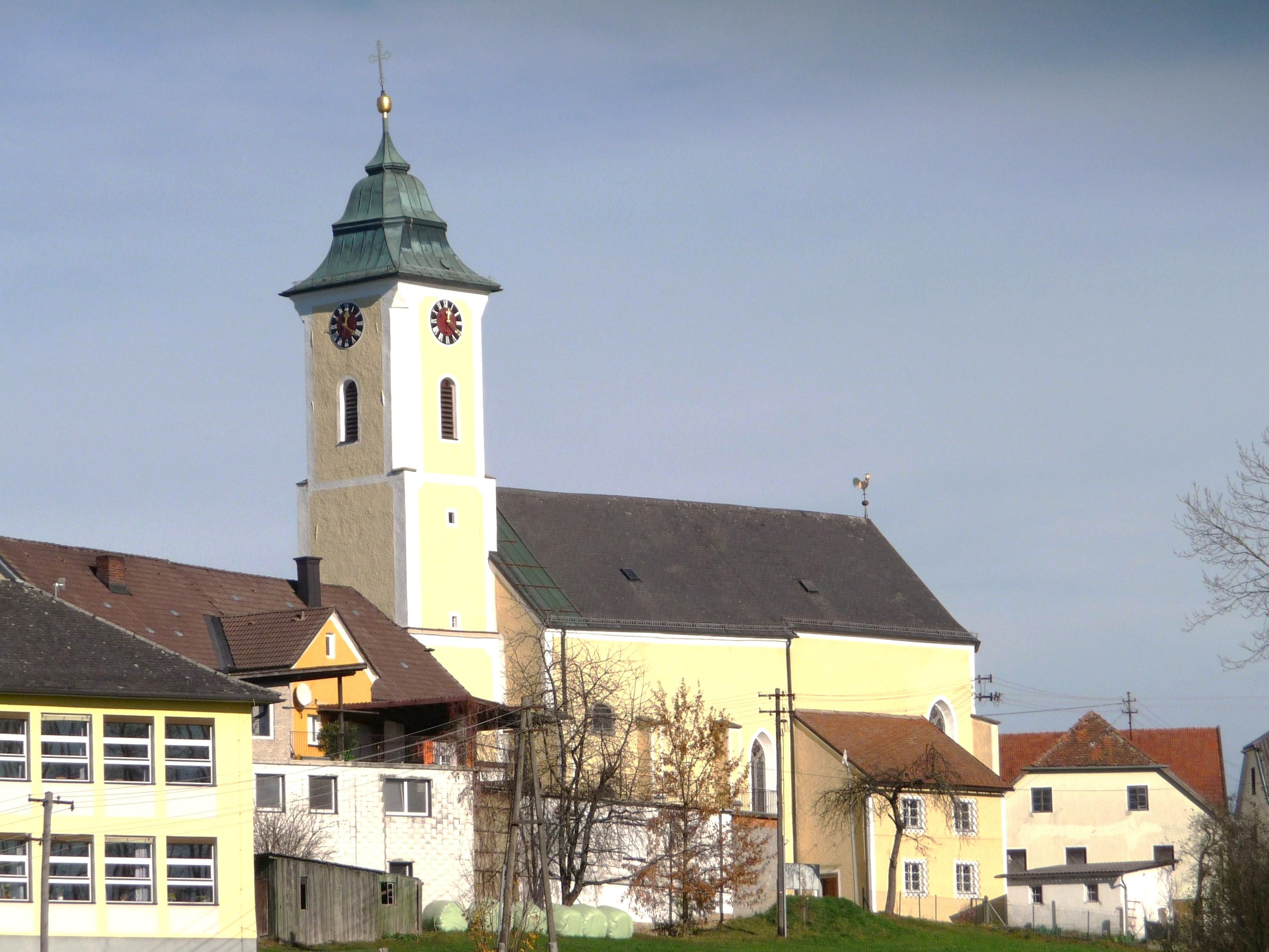 Die Kirche von Sankt Roman, Bezirk Schärding, Oberösterreich